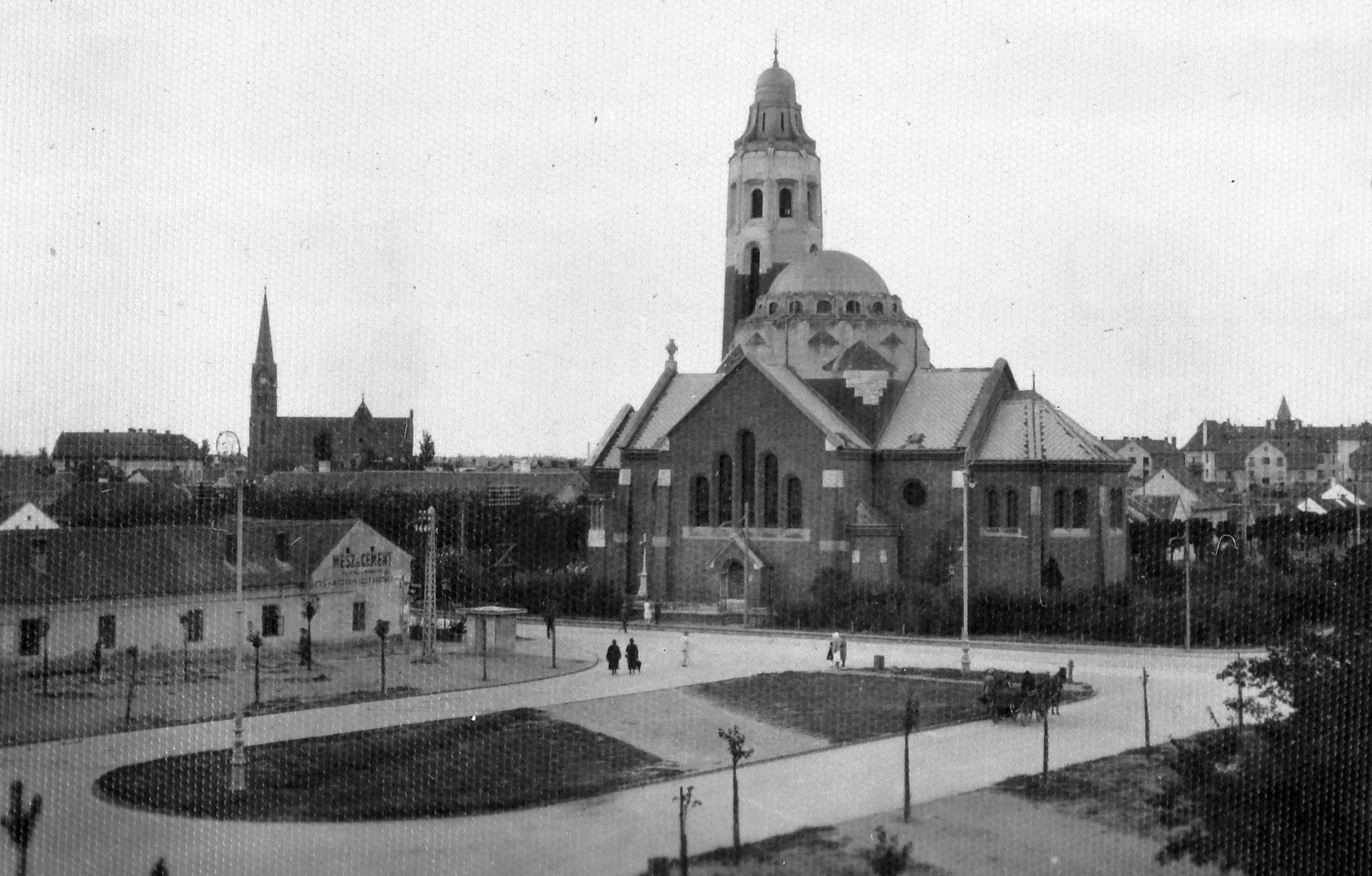 Attila tér, görög katolikus templom. Location: Hungary, Debrecen Tags: church Title: Attila tér, görög katolikus templom.